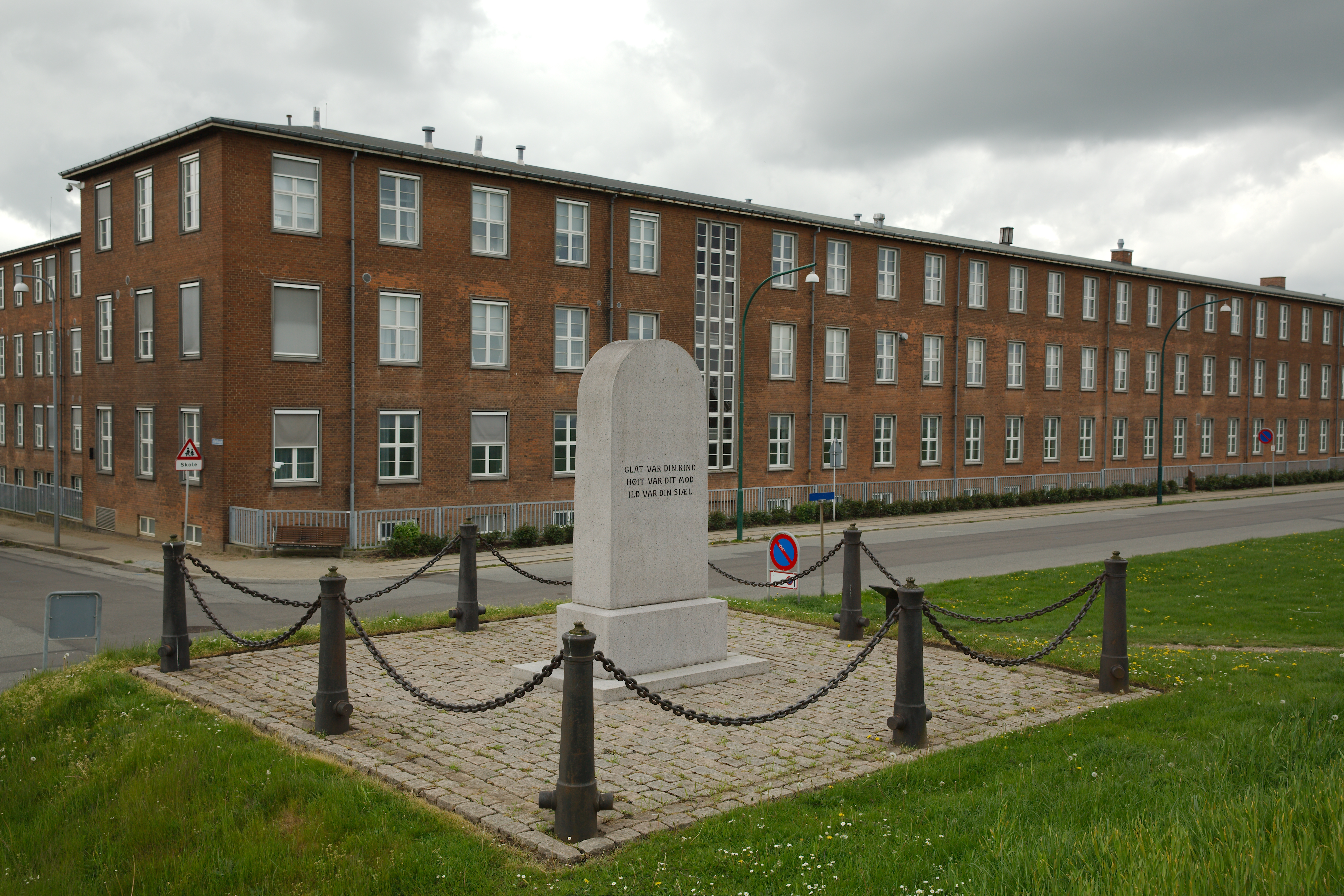 Bagsiden af mindesmærke for Peter Buhl ved Bülows Kaserne